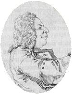 Leonardo Vinci, compositor